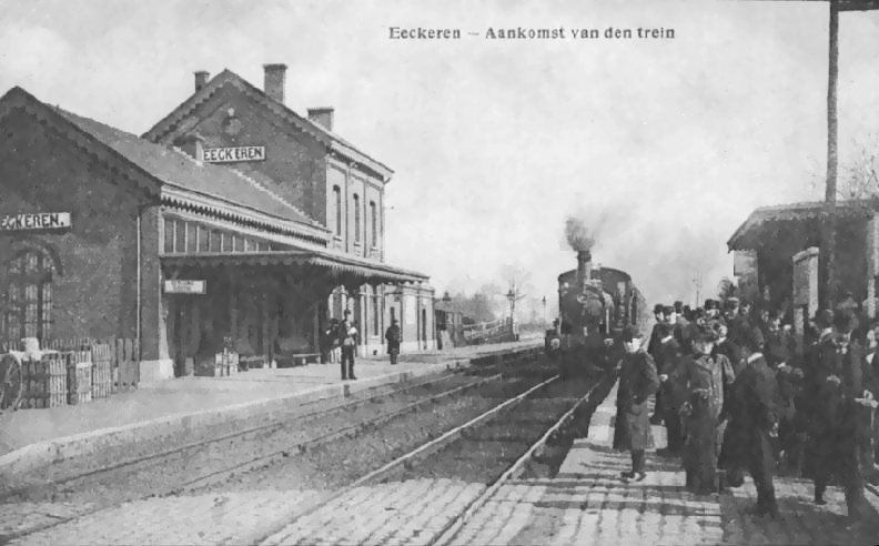 Intérieur de la gare, avec desserte d'un train vapeur vers 1910.